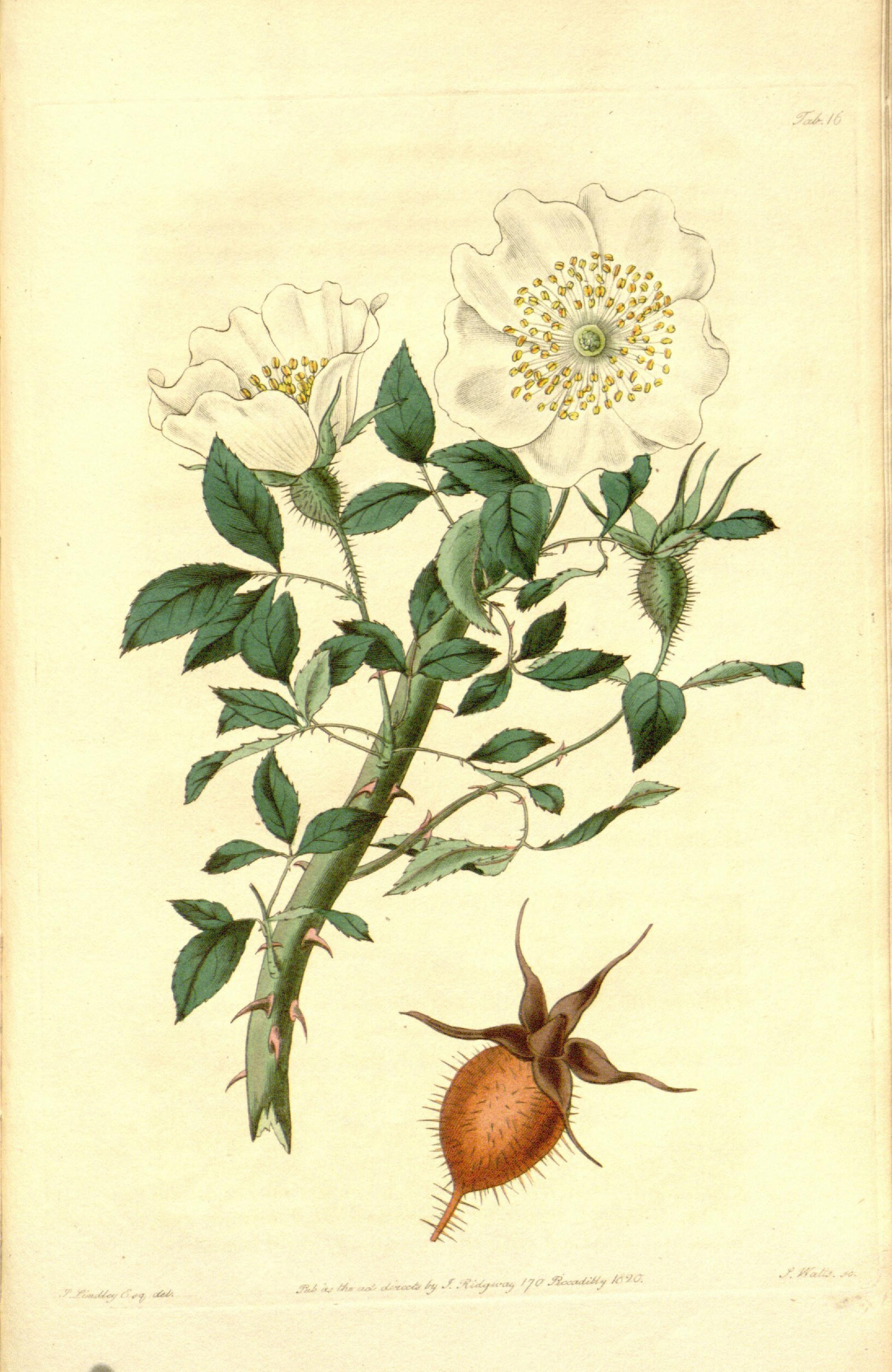 Rosa sinica